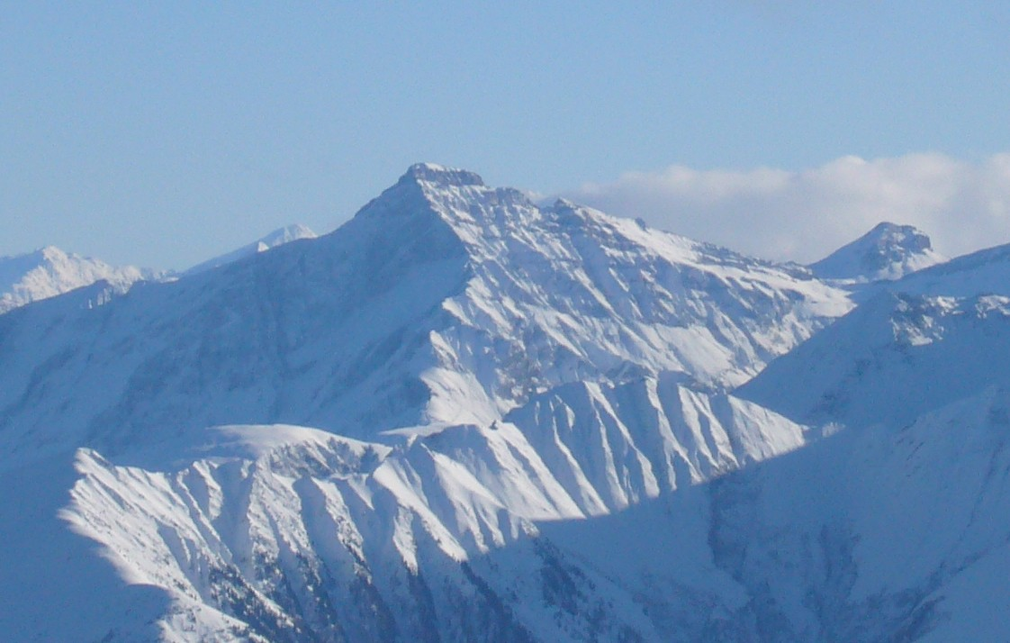 Piz Beverin von Cassons gesehen, aus Nord-Nordwest. Blick über das Hinterrheintal, hinter dem gezackten Kamm zum Schlüechtli liegt das Safiental und darüber der Piz Beverin.